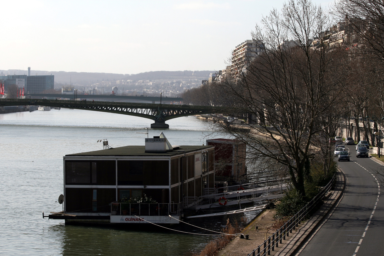 Centre nautique des Glénans à Paris